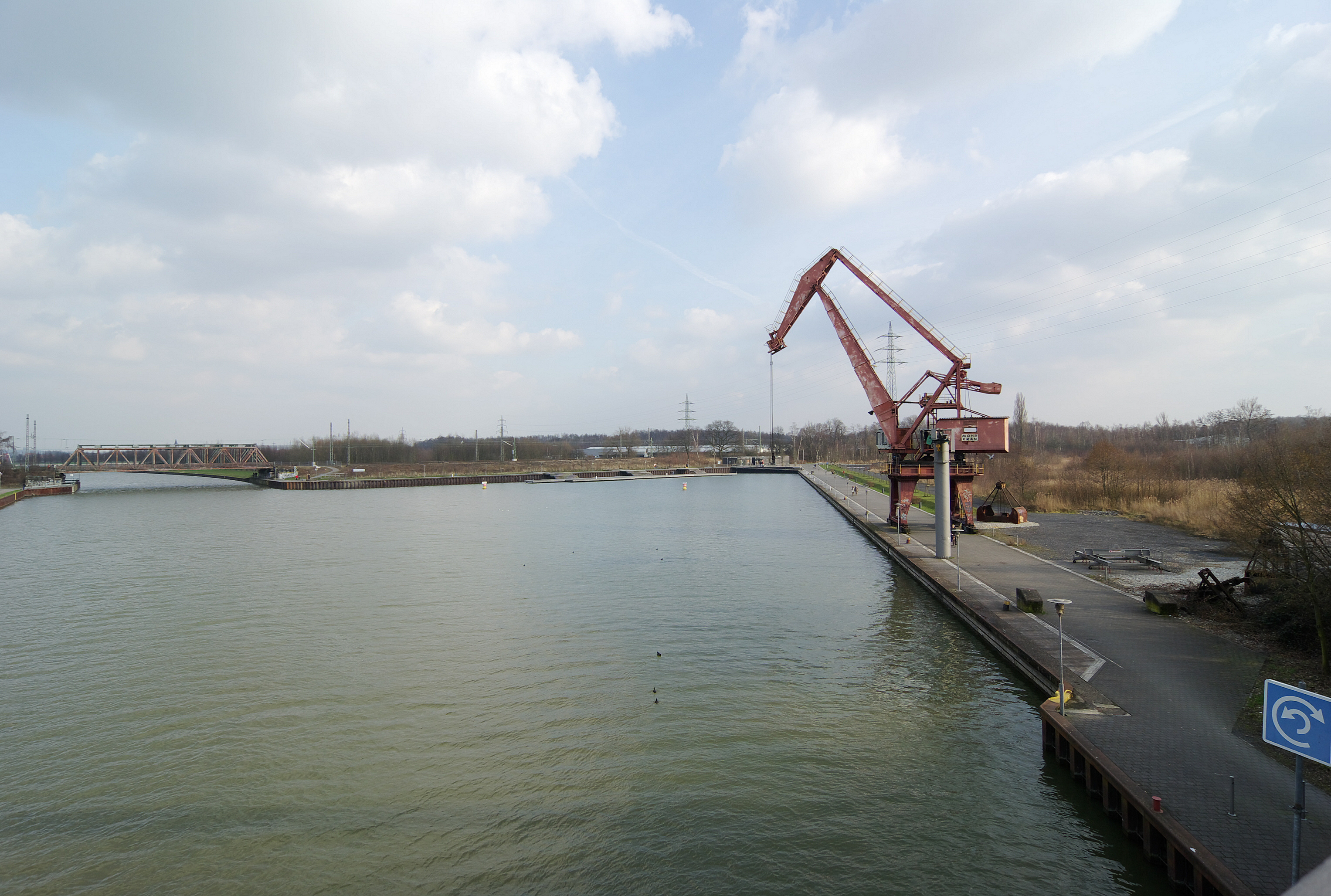 Preußenhafen Lünen, Nordrhein-Westfalen. Der Hafen liegt am Dattel-Hamm-Kanal und diente als Umschlagplatz für die Zechen Preußen in Lünen und Gneisenau in Dortmund-Derne. Heute wird der hafen touristisch genutzt.